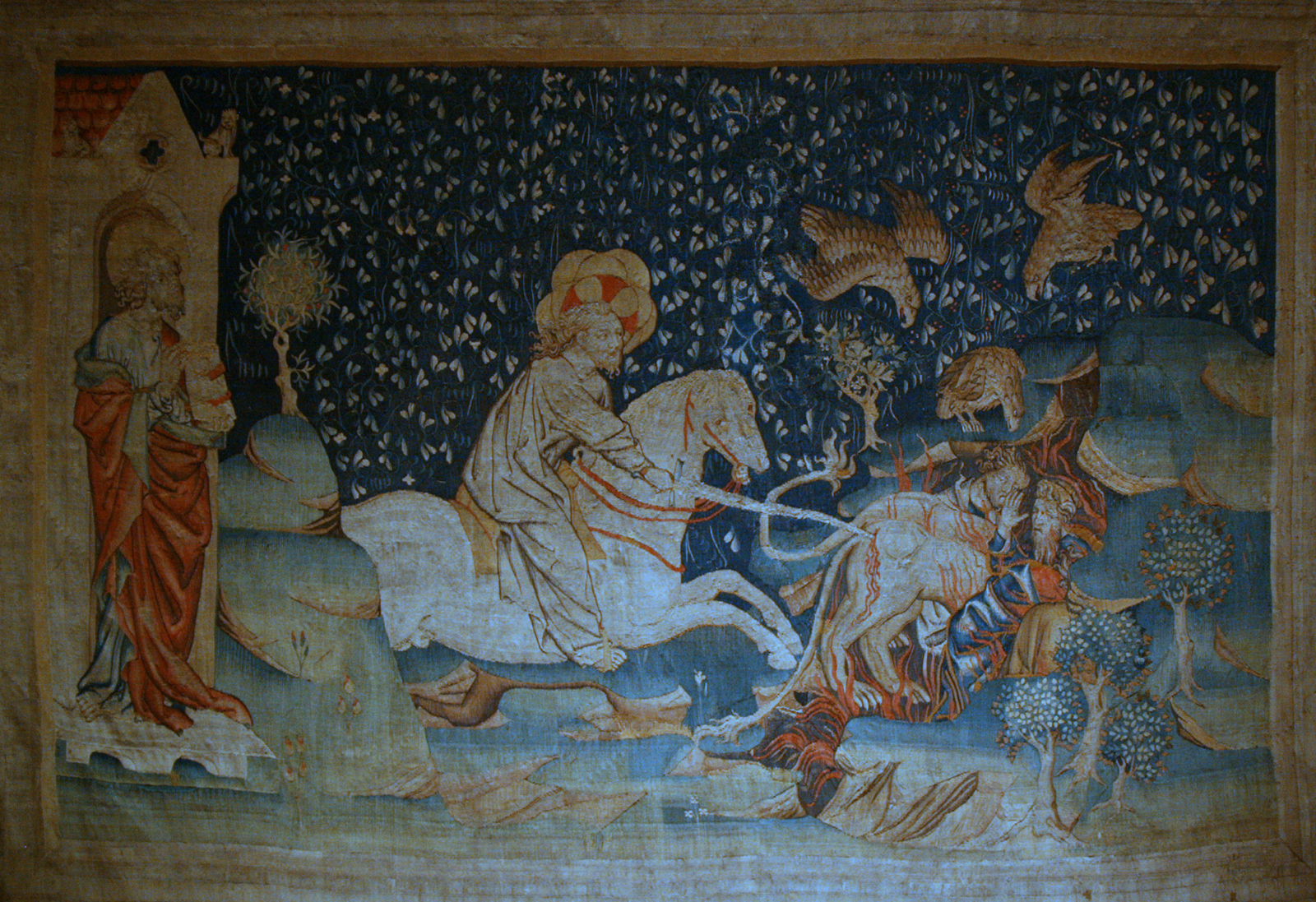 L'Apocalypse au château d'Angers